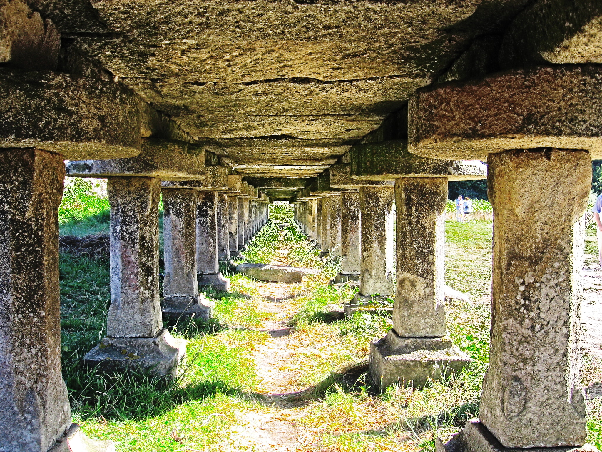 El hórreo de Carnota desde otro punto de vista.